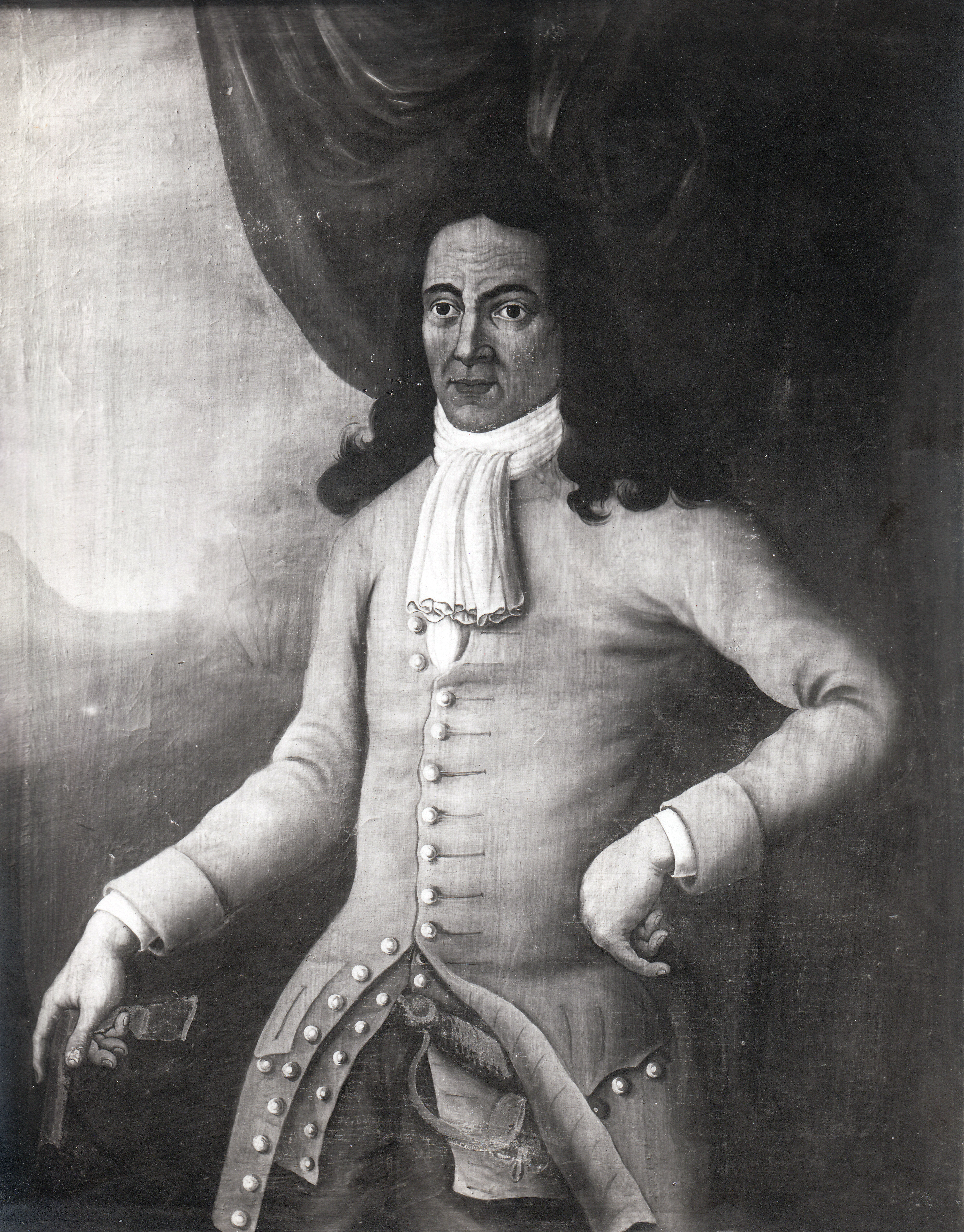 Format: Fotopositiv Dato / Date: 1897 Fotograf / Photographer: Erik Olsen (1835 - 1920) Sted / Place: Trondheim Eier / Owner Institution: Trondheim byarkiv, The Municipal Archives of Trondheim Arkivreferanse / Archive reference: Tor.H41.B40.F2988 Merknad: Fra utstillingen i anledning Trondhjems 900-årsjubileum i 1897. Utstillingstekst i Trondhjems 900 Aars Jubilæum: Katalog for Den Historiske Udstilling i Trondhjem 1897: 1097. Lossius, Lorentz, d. 1654, Grundlægger af Røros Værk og Værkets første Direktør. Var Schichtmester ved Kvikne Kobberværk, da han sammen med Bergskriveren sammesteds Peter Petersen 28. August 1644 erhvervede Muthingsseddel paa en Ertsgang i Rødhammeren, Øst for Røros. Da Anvisningen ikke viste sig drivværdig, begynte Lossius i det følg. Aar driften af Storvarts og fik Smeltningen igang i en ved Hitterelven opført Hytte. Ved Intriger fra den bekjendte Jochum Jürgens' Side maatte han allerede i 1646 give Slip paa den ham tilhørende Eiendomsret til 1/3 af Værket og nøie sig med en liden Part samt Stillingen som Direktør. Hertil blev han udnævnt i 1646, men i 1651 afsat af Jochum Irgens. Den lange Inskription under Maleriet "Lessus super Lossium" paa Latin med Fortsættelse paa Norsk findes aftrykt i sin Helhed i Hiort (og Krags) Efterretninger om Røros Kobberværk (Chra. 1846), pag. 38 ff. OM., halv Figur i fuld Størr., iført blaa Frakkemed Sølvknapper, langt Haar, Kaarde ved Siden og en Hakkel i høire Haand. * Røros Kirke.